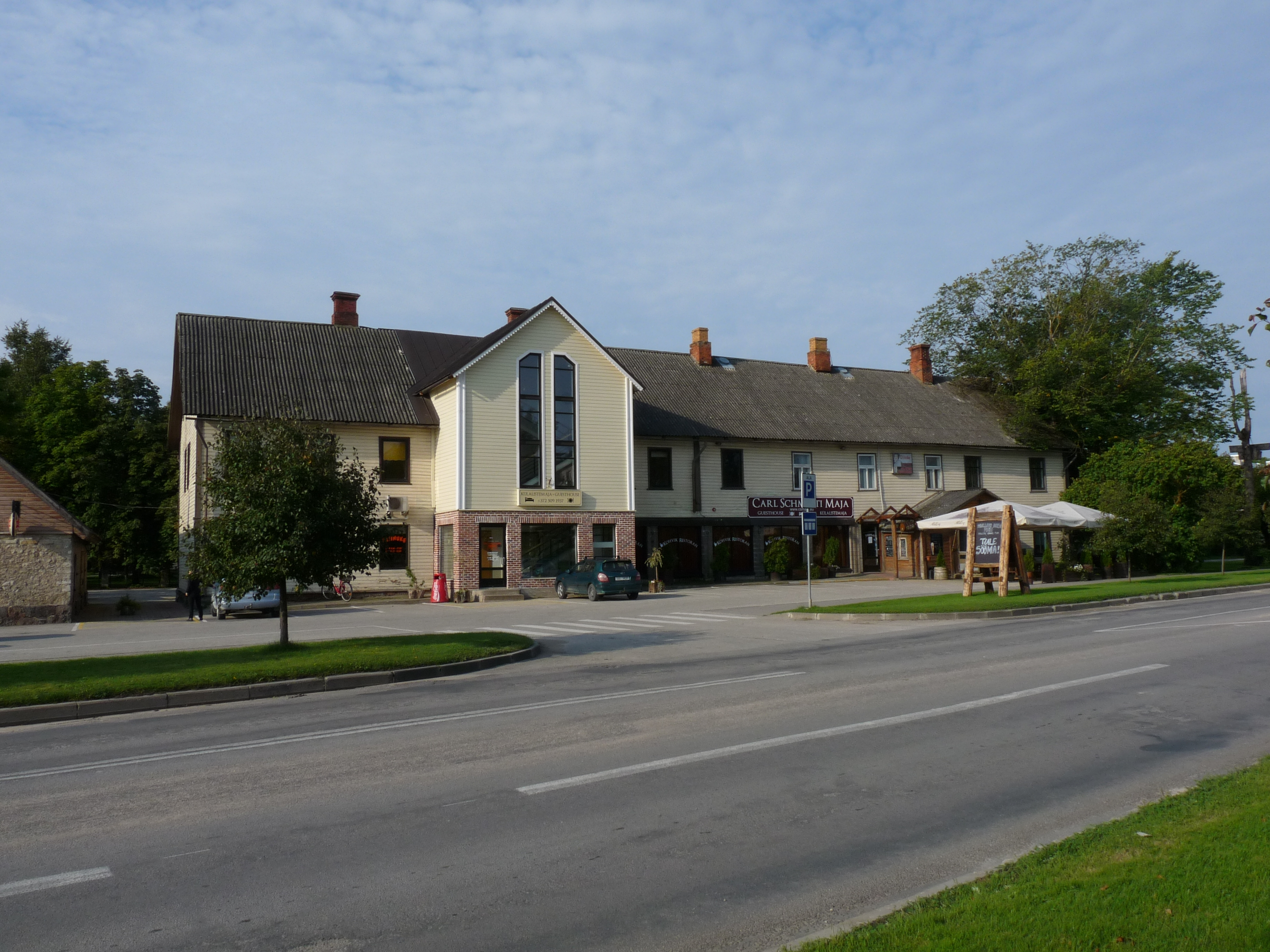 Põltsamaa kunagise alevivanema Carl Schmidti maja, Kesk 4, 11. september 2012.